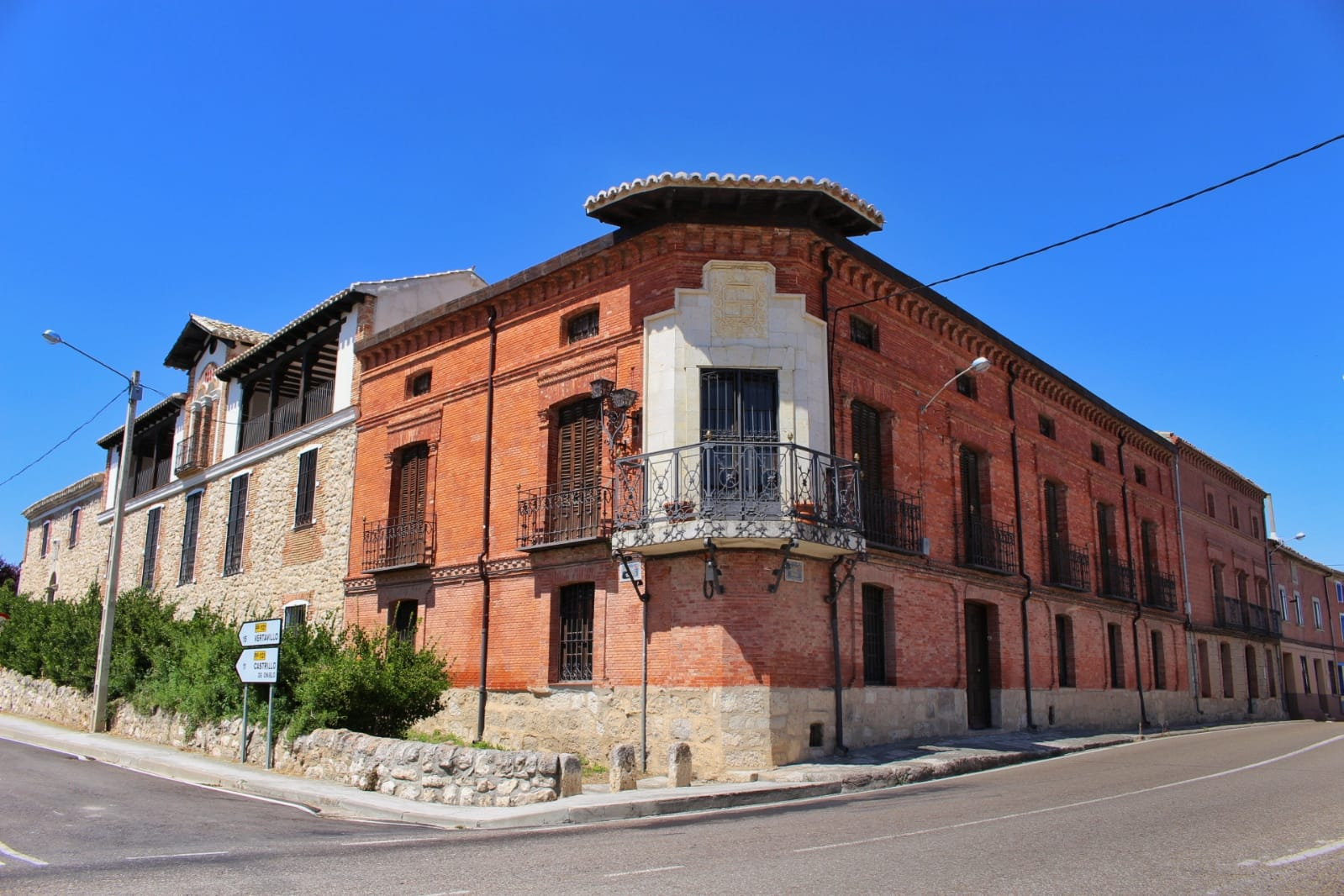 Arquitectura de Baltanás